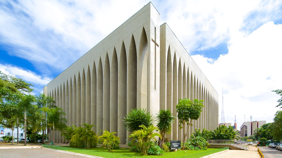 Santuário localizado na W3 SUL